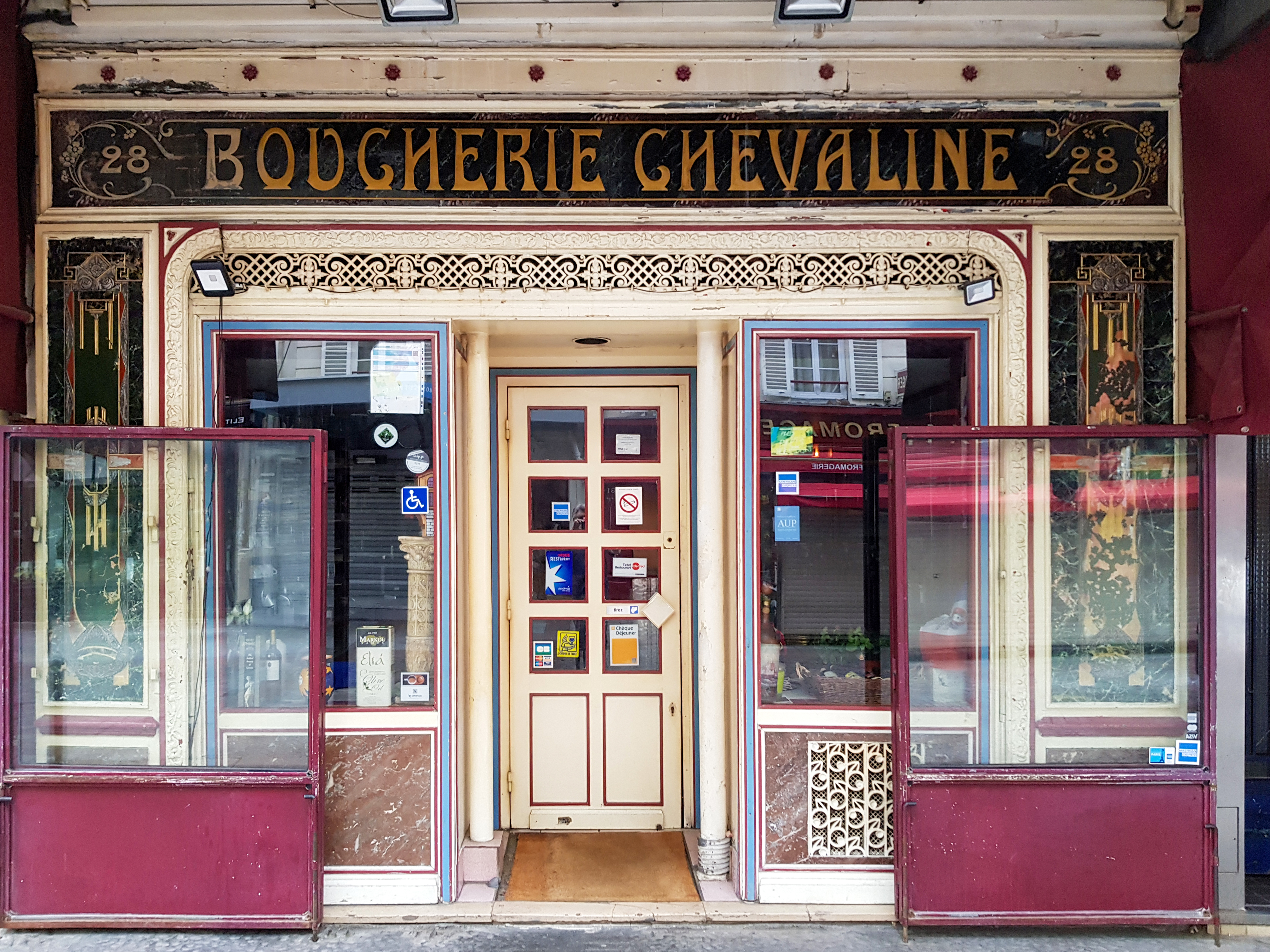 Boucherie chevaline, 28, rue Cler, Paris 7e.